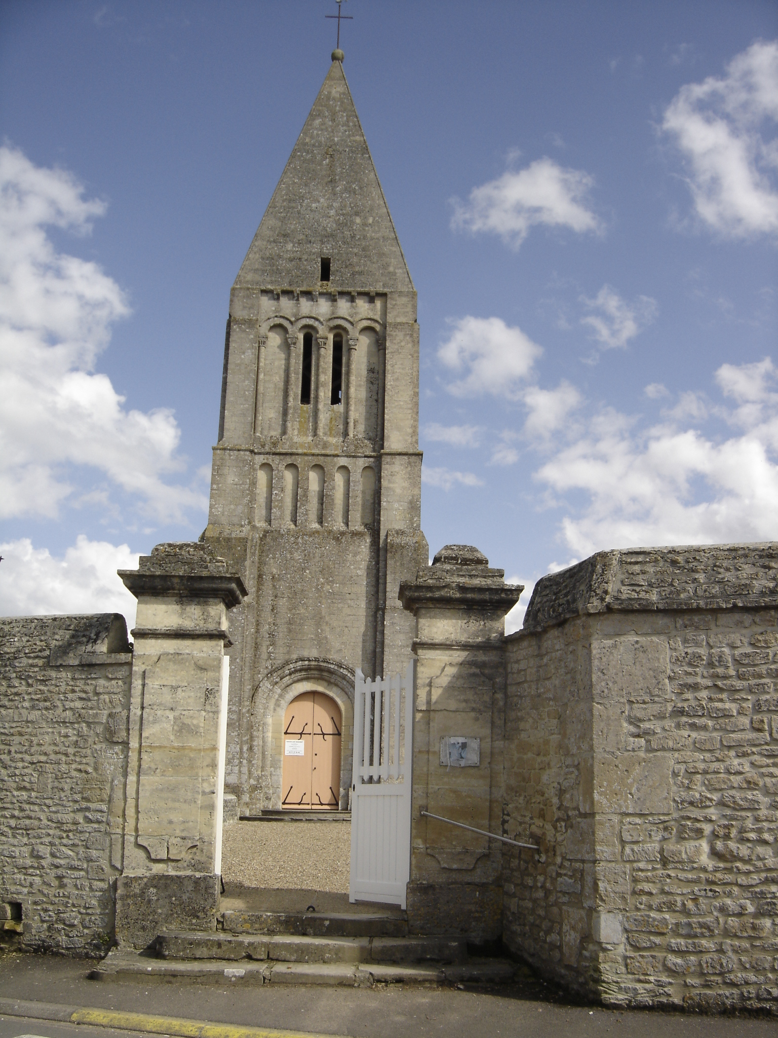 clocher porche de l'église, classé en 1927, il a été détruit en 1944 et n'a pas retrouvé sa hauteur d'origine